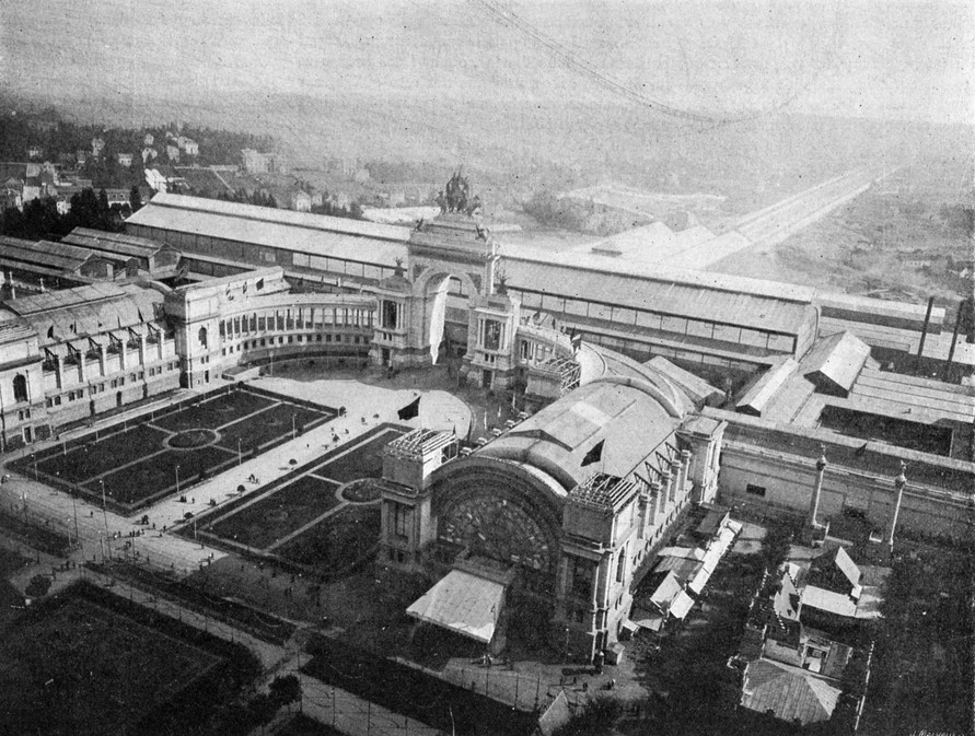 Vue du Palais du Cinquantenaire lors de l’Exposition universelle de 1897